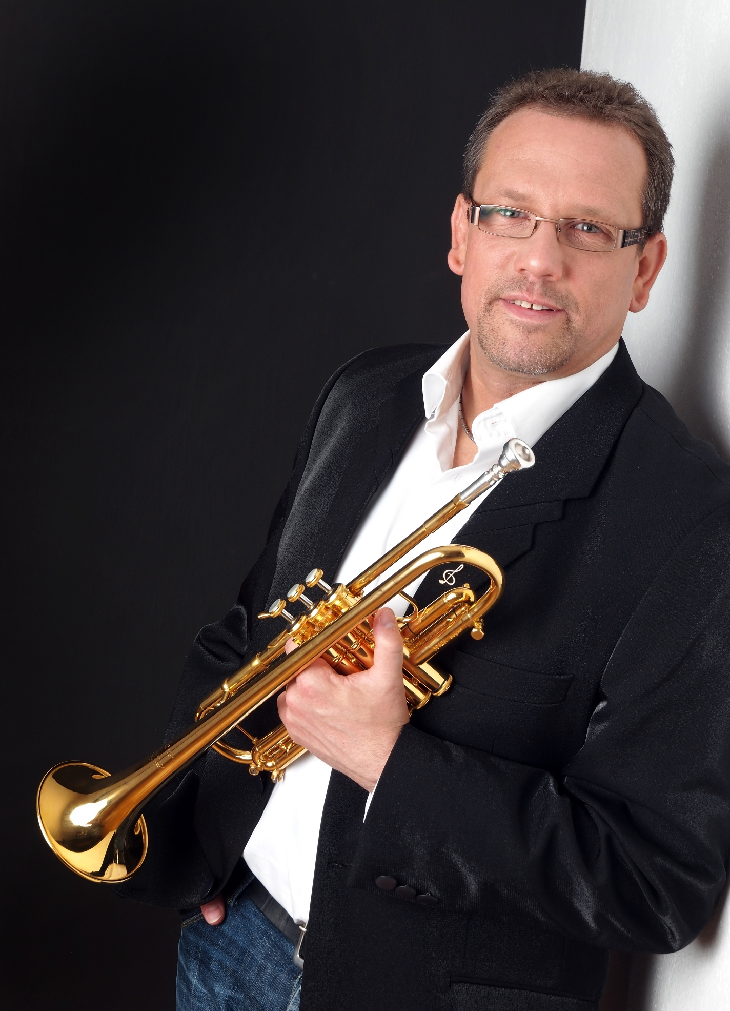 Trompeter, Komponist, Autor und Bandleader Holger Mück